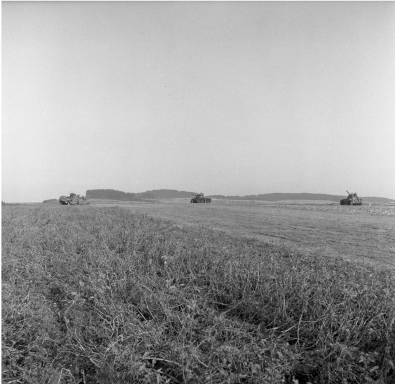 Herbstübung des Heeres: Fla-Panzer im Raum Altenkirchen-Hachenburg (Oberwesterwald)